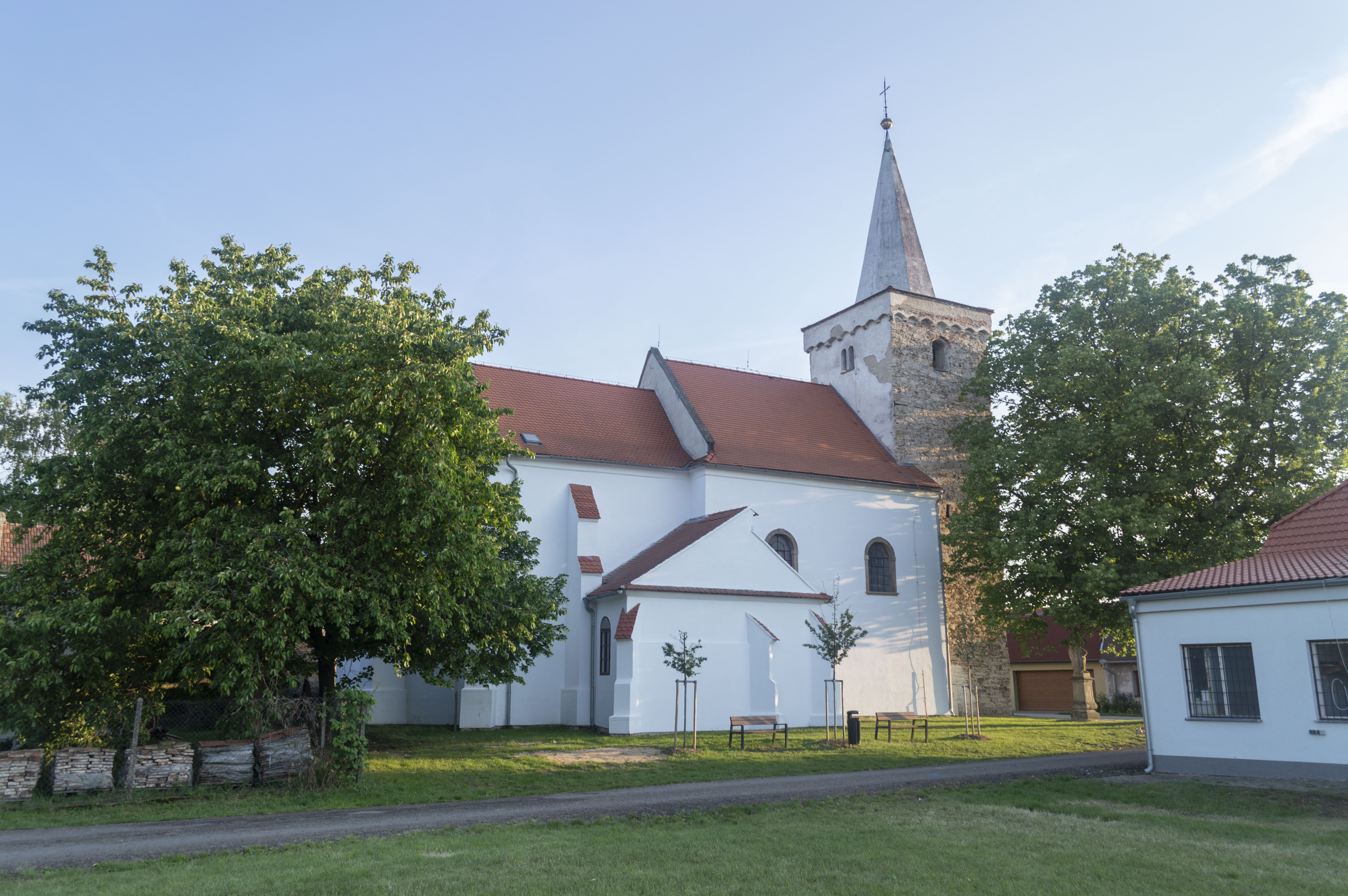 Kostel v Suchohrdlích u Miroslavi, pohled ze severu.